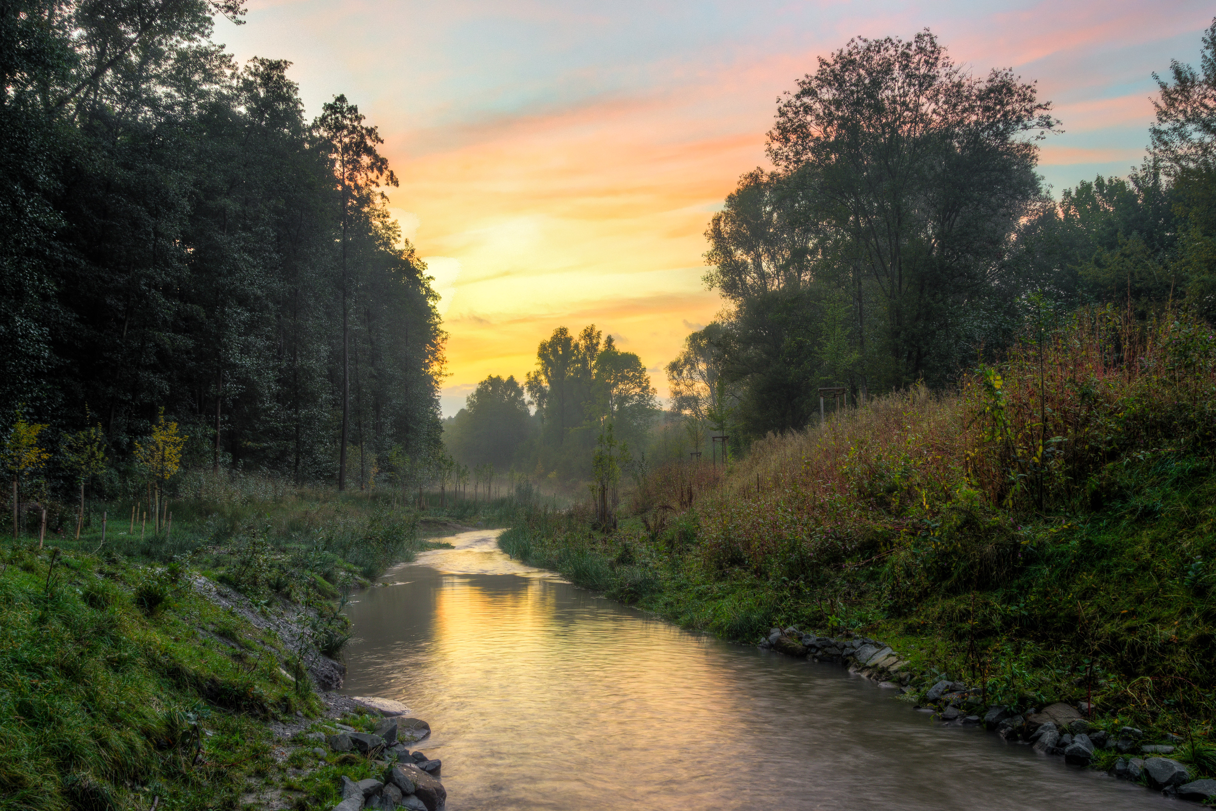 Sonnenuntergang über der renaturierten Emscher in Dortmund. – HDR aus neun Einzelbildern. Camera Name: Nikon D5100 Lens: 24-120 mm f/3.5-5.6 Capture Parameters: 24 mm, 0,4 sec. at f/10, ISO 800, no flash Resolution: 4880 x 3254 pixels Software: Adobe Photoshop Lightroom 4.1 (Windows) Copyright: eselsmann Rights Usage Terms: CC-BY-3.0 (